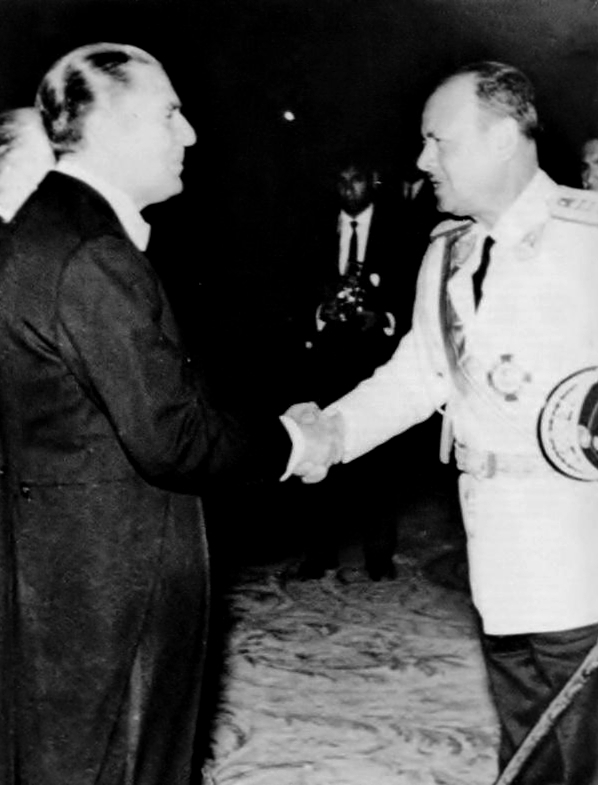 El general Juan Velasco Alvaradco y el presidente Fernando Belaúnde Terry horas antes del golpe de 1968 contra el segundo, elegido constitucionalmente